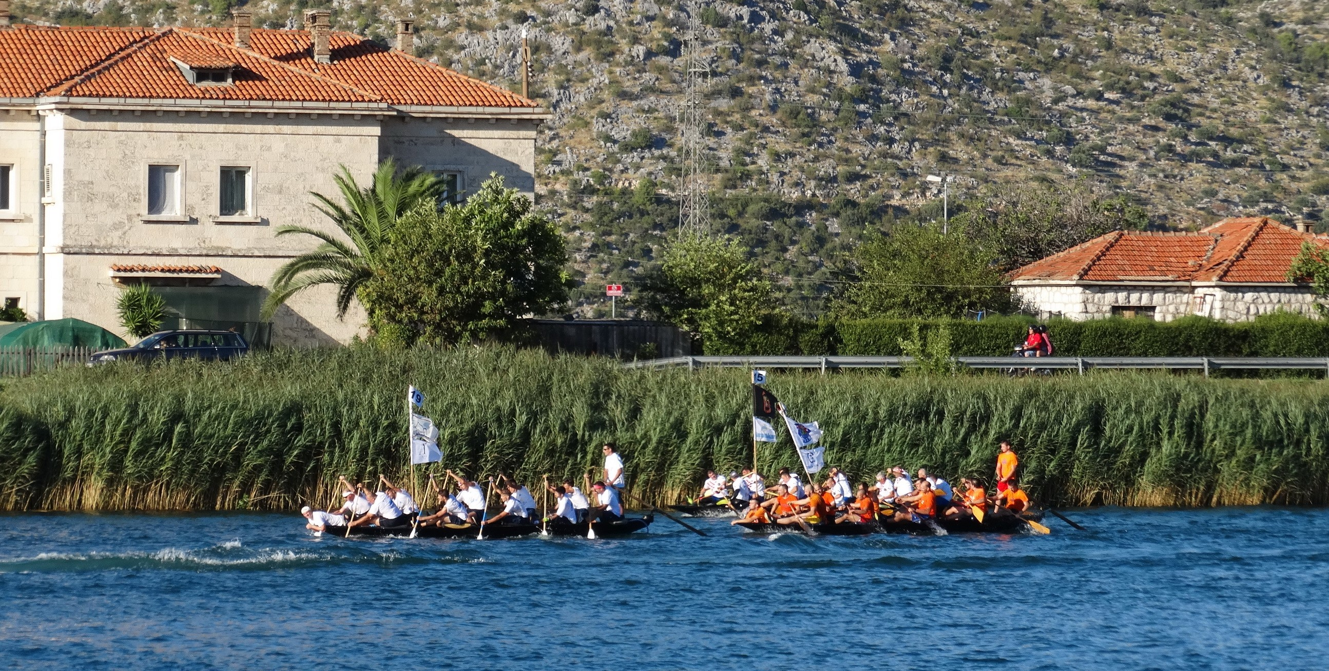 Lađari kod Opuzena